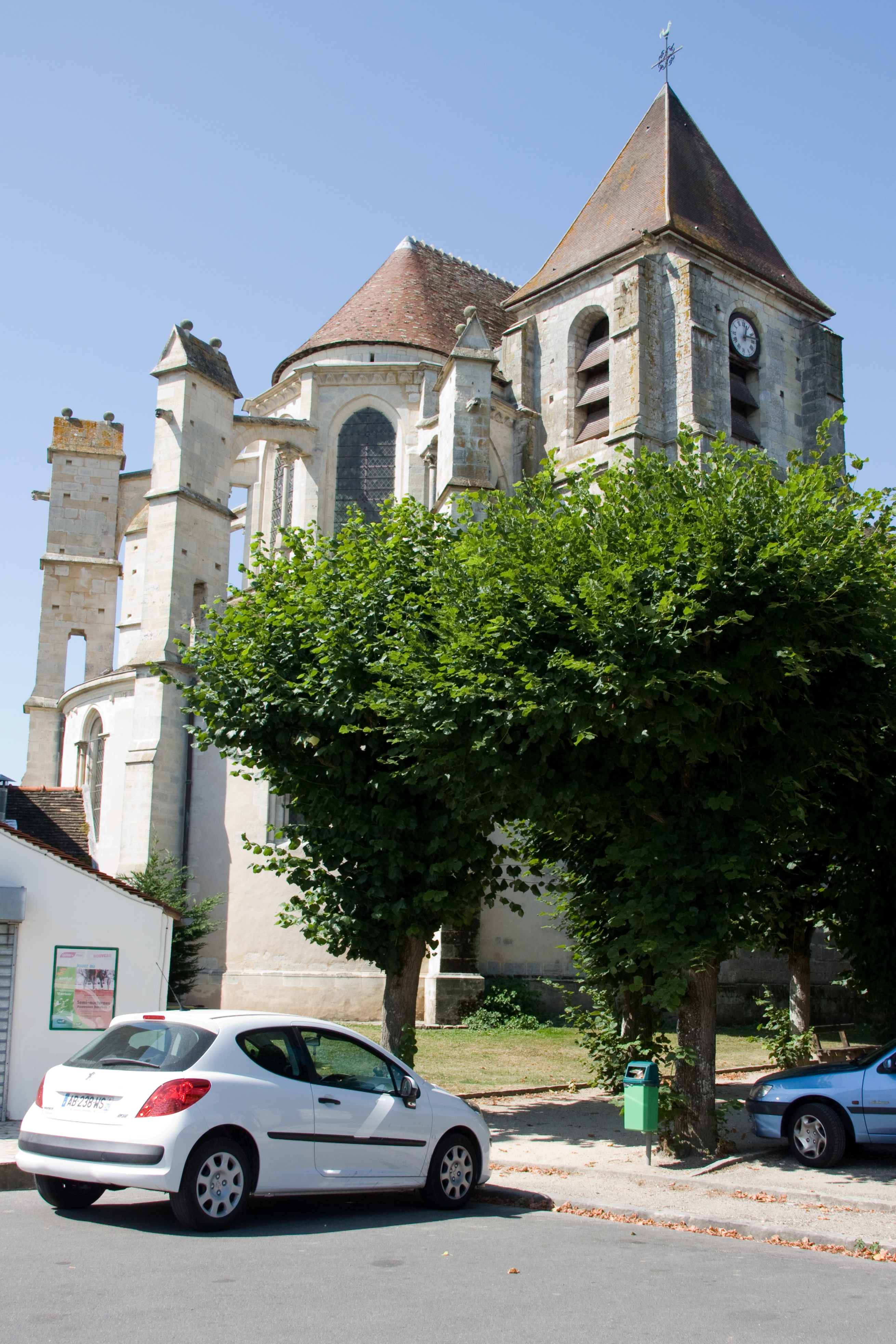 Eglise de Champcueil, Champcueil, Essonne, France